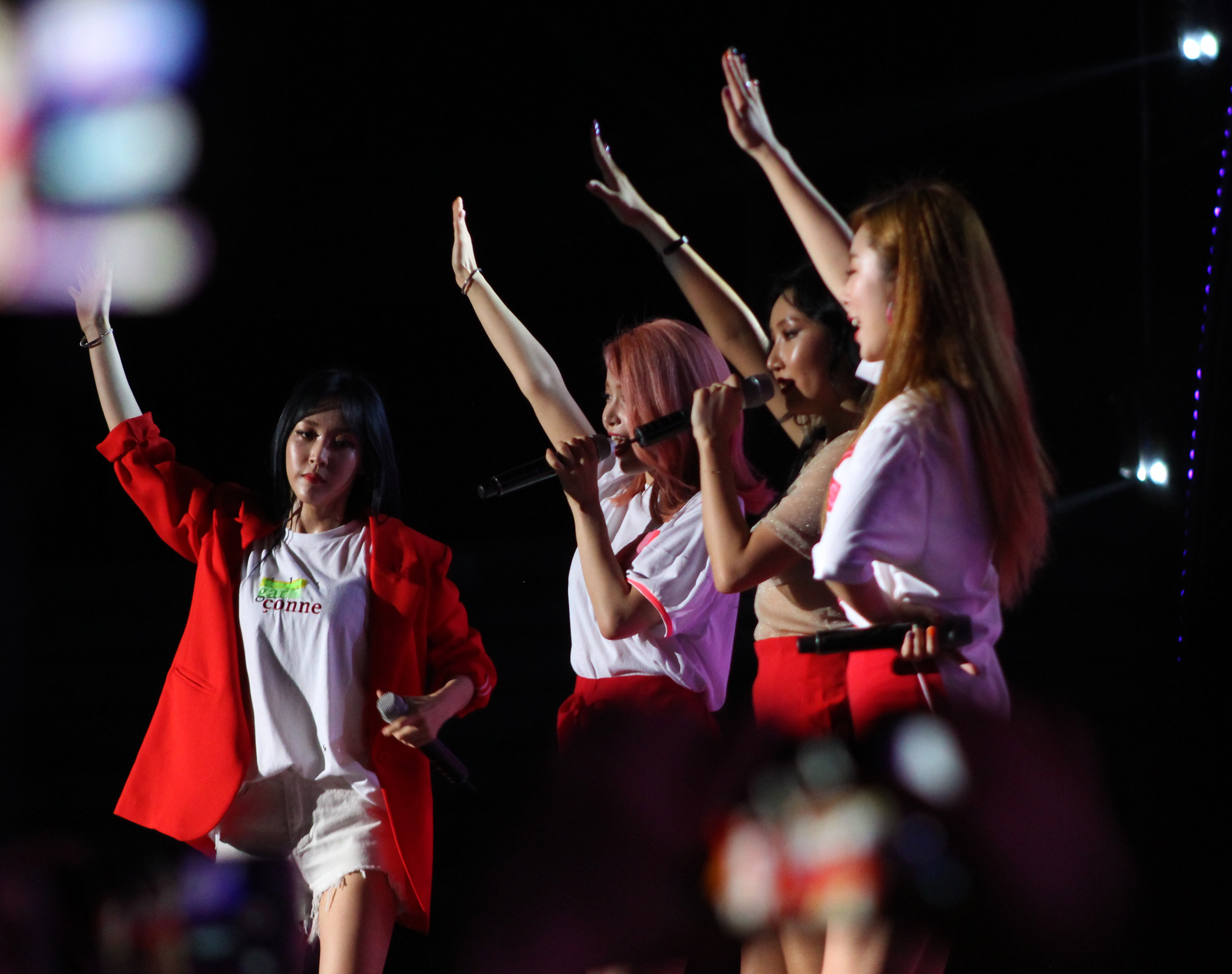 170719 대구치맥페스티벌